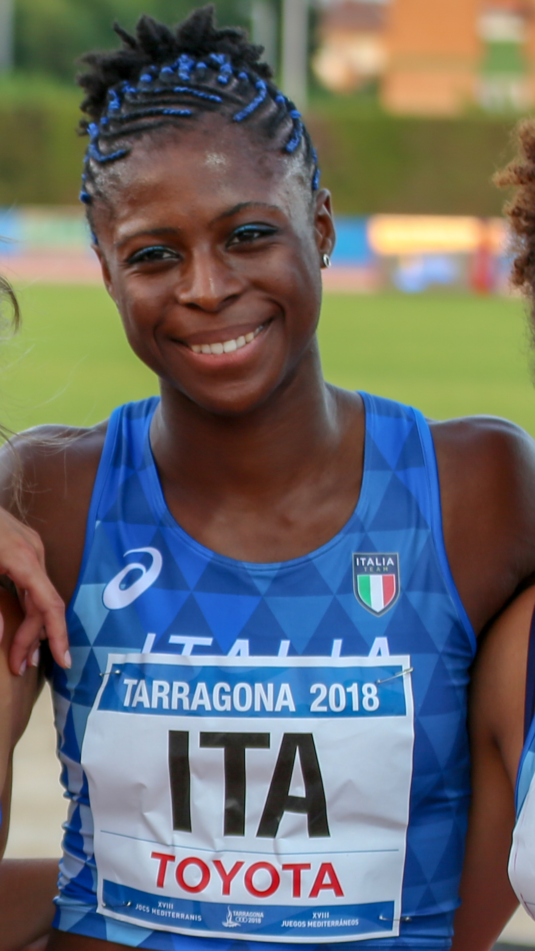 Gloria Hooper en los relevos 4x100 en los Juegos del Mediterráneo 2018